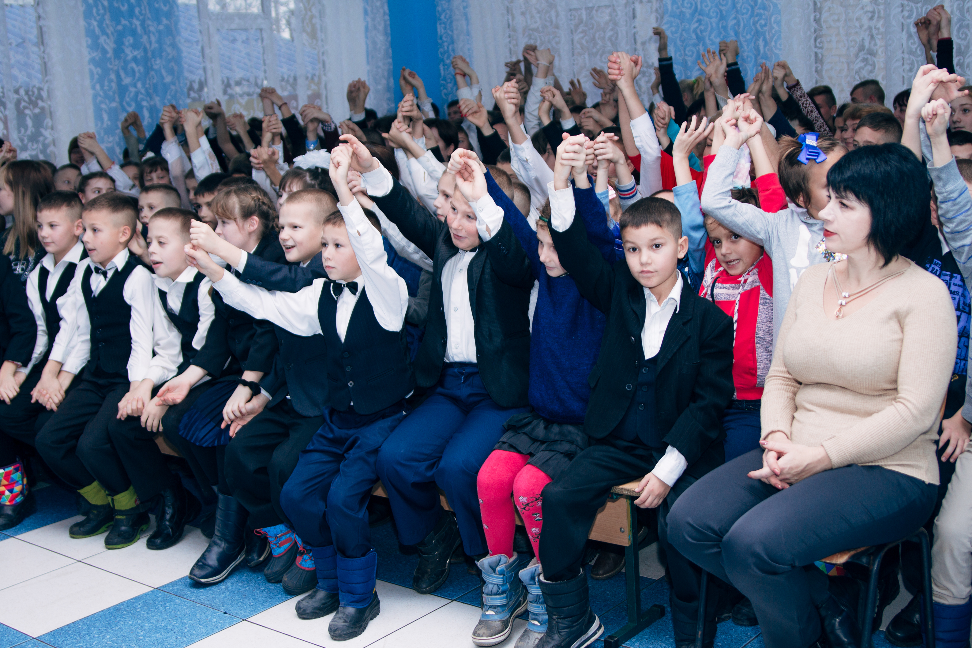 Отримання подарунків